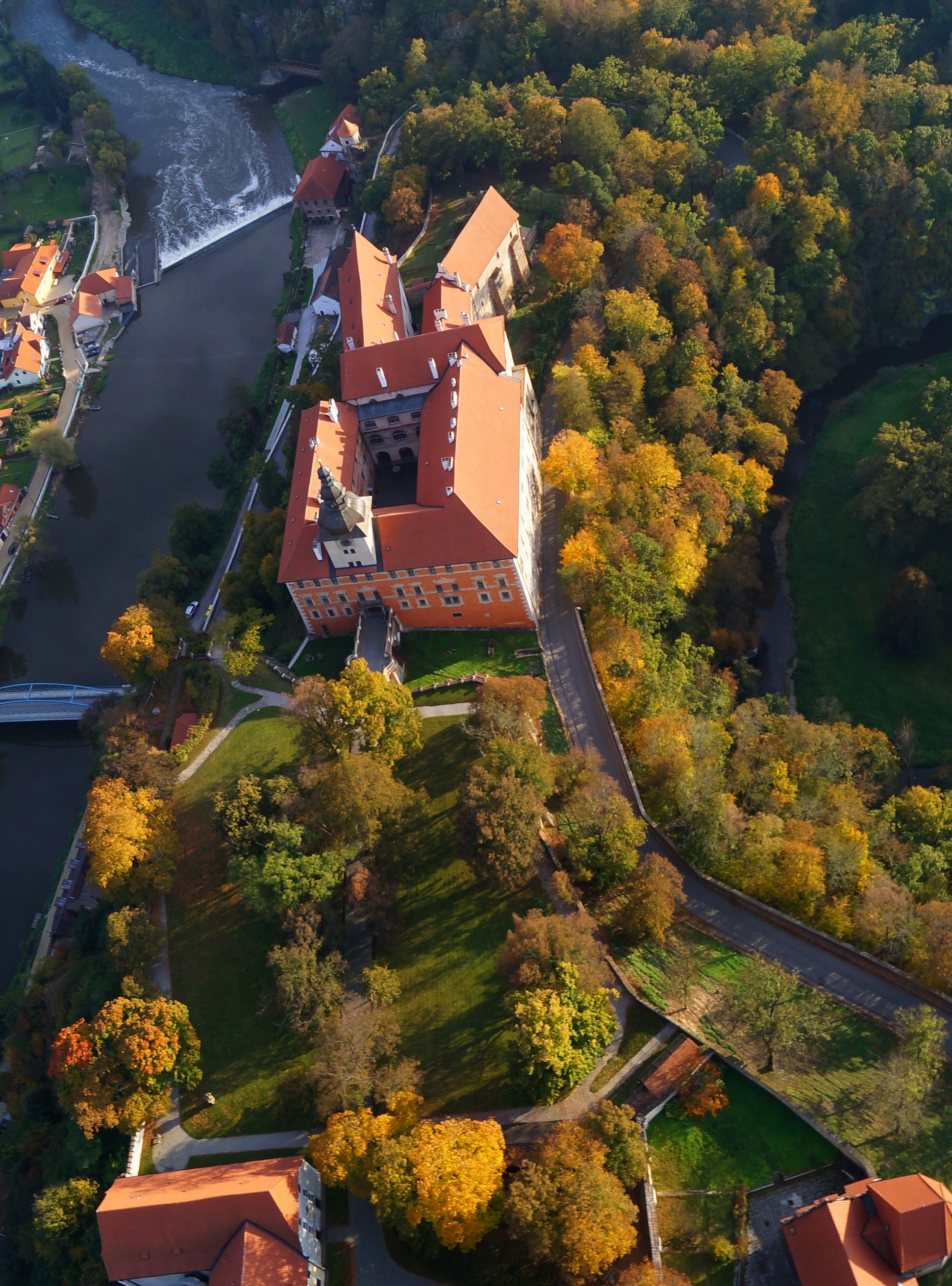 Zámek Bechyně, Bechyně 1